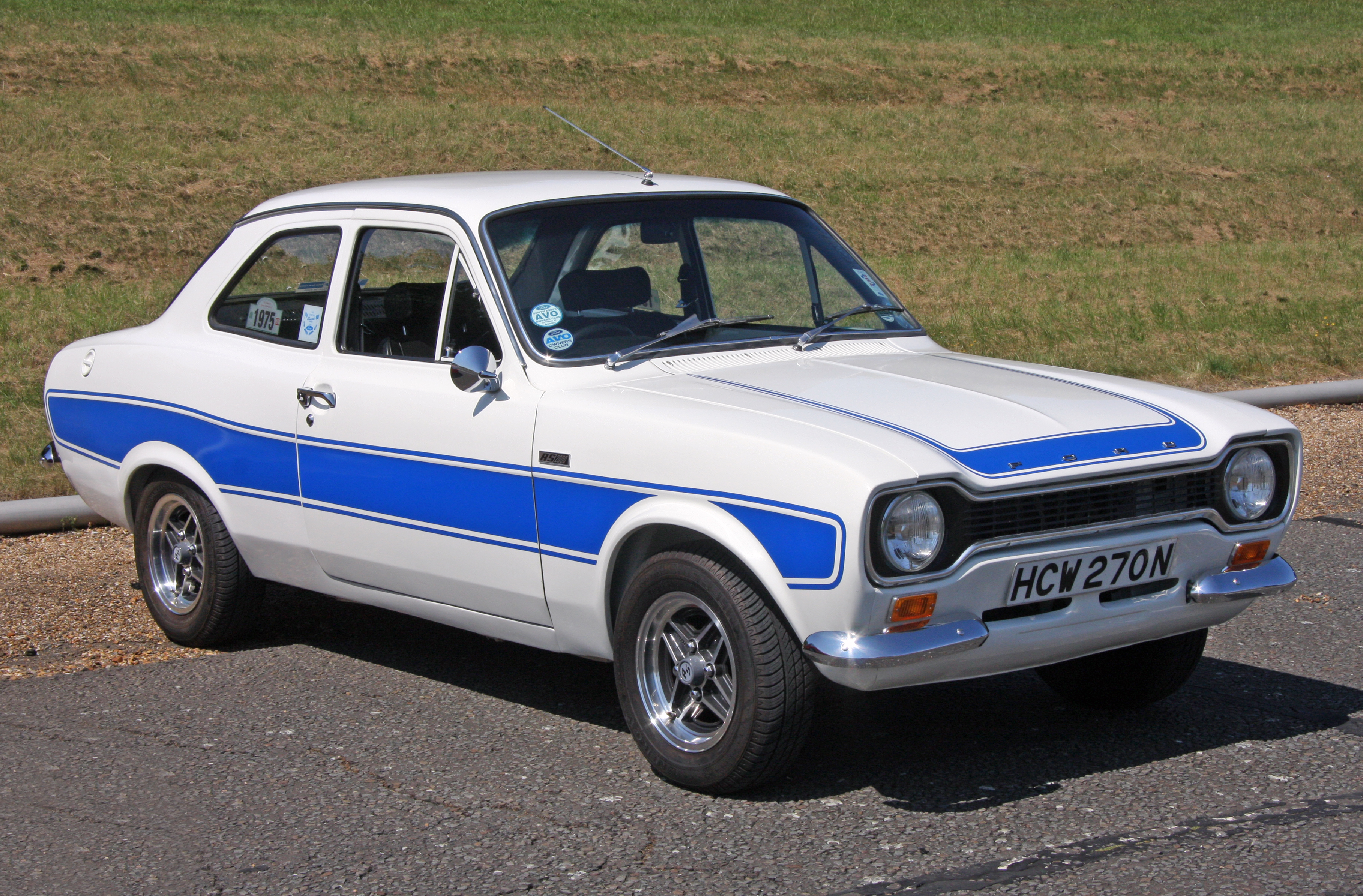 Ford Escort MkI v Essexu v Anglii